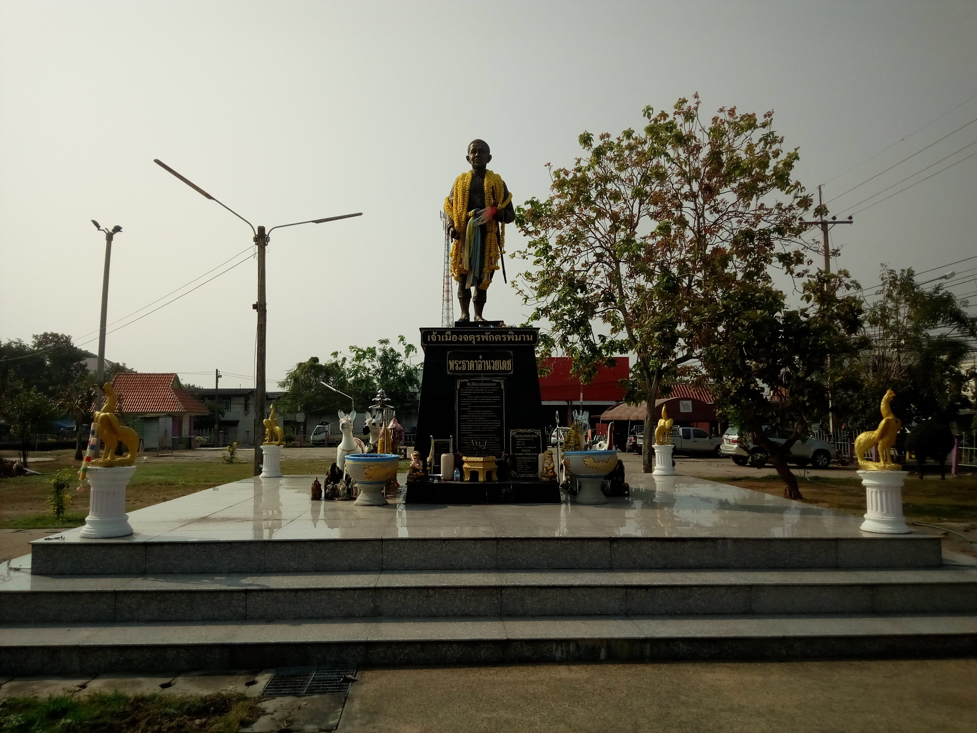 ท้าวมหาไชย